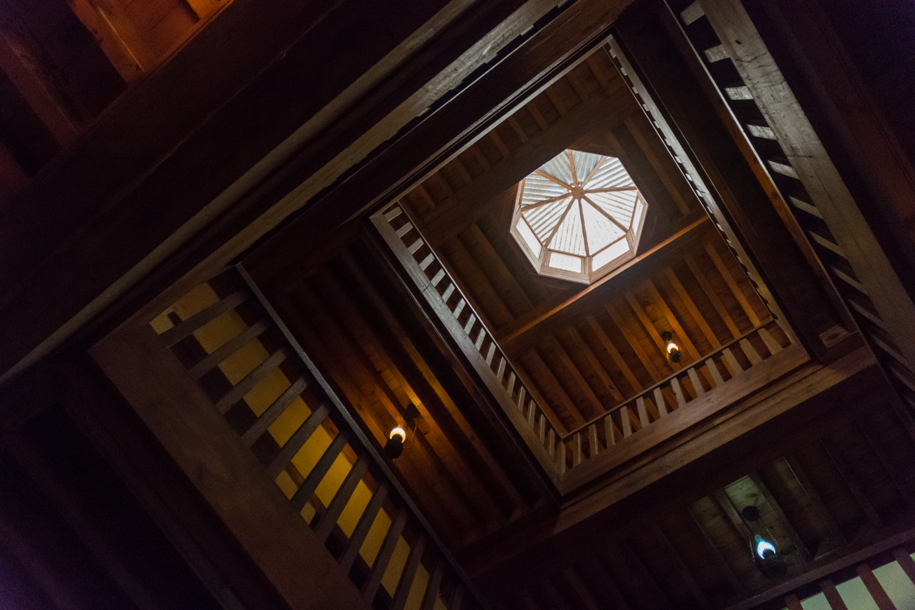 بيت الميزوني بمدينة رشيد محافظة البحيرة